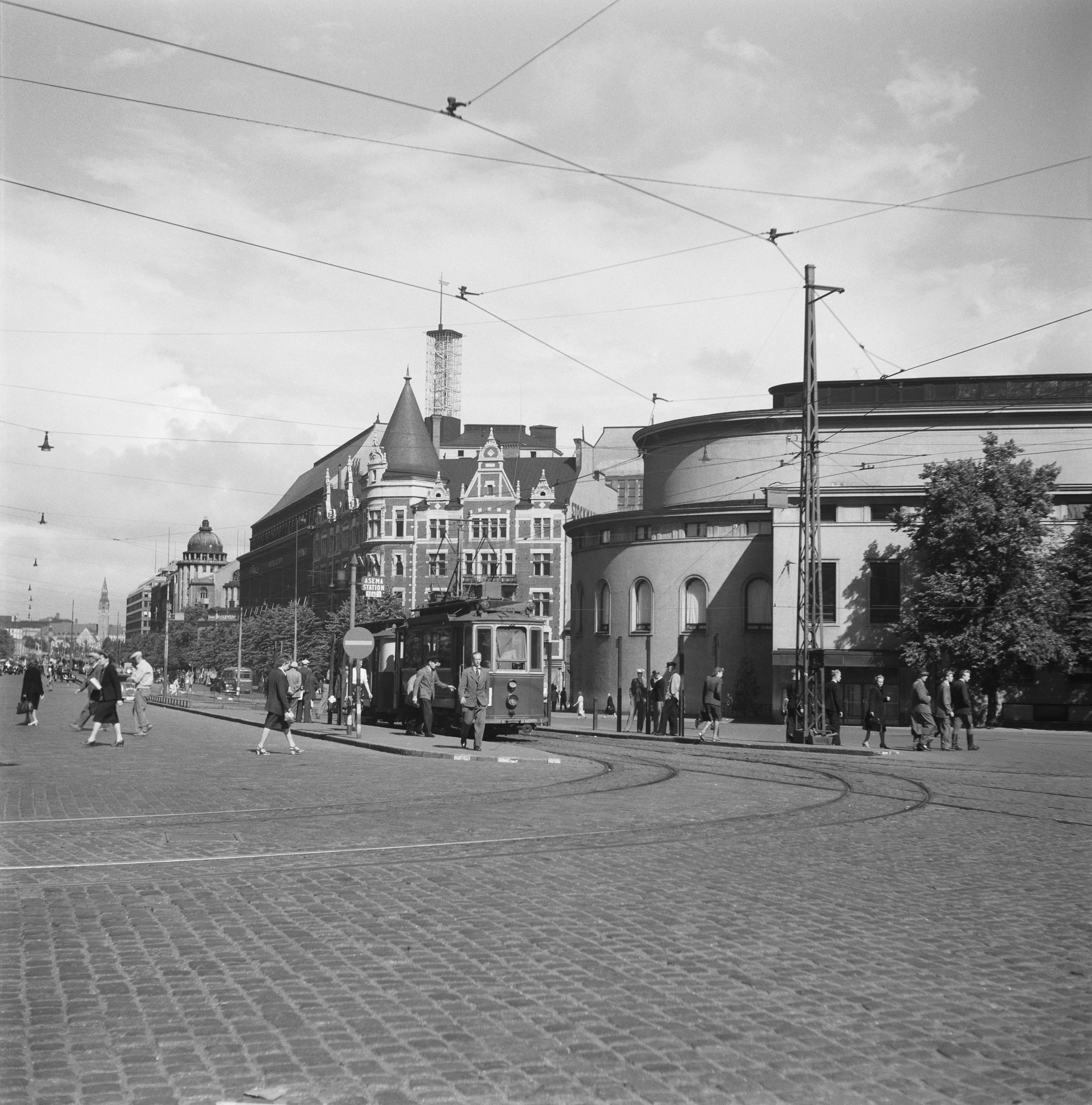 Katunäkymä Helsingin Mannerheimintieltä. Etualalla Ruotsalainen teatteri (Svenska teatern) ja taustalla Argo-talo, nykyään Stockmannin tavaratalo. Talossa sijaitsi Wulffin paperikauppa, joka kuvassa jää raitiovaunun taakse. Kuvausaika arvioitu kuukauden tarkkuudella. Tiedätkö jotain tästä kuvasta? Jätä kommentti tai ota yhteyttä sähköpostitse: Tutustu Ylen arkistosisältöihin: Fler skatter från Yles arkiv: More about Yle, the Finnish Broadcasting Company